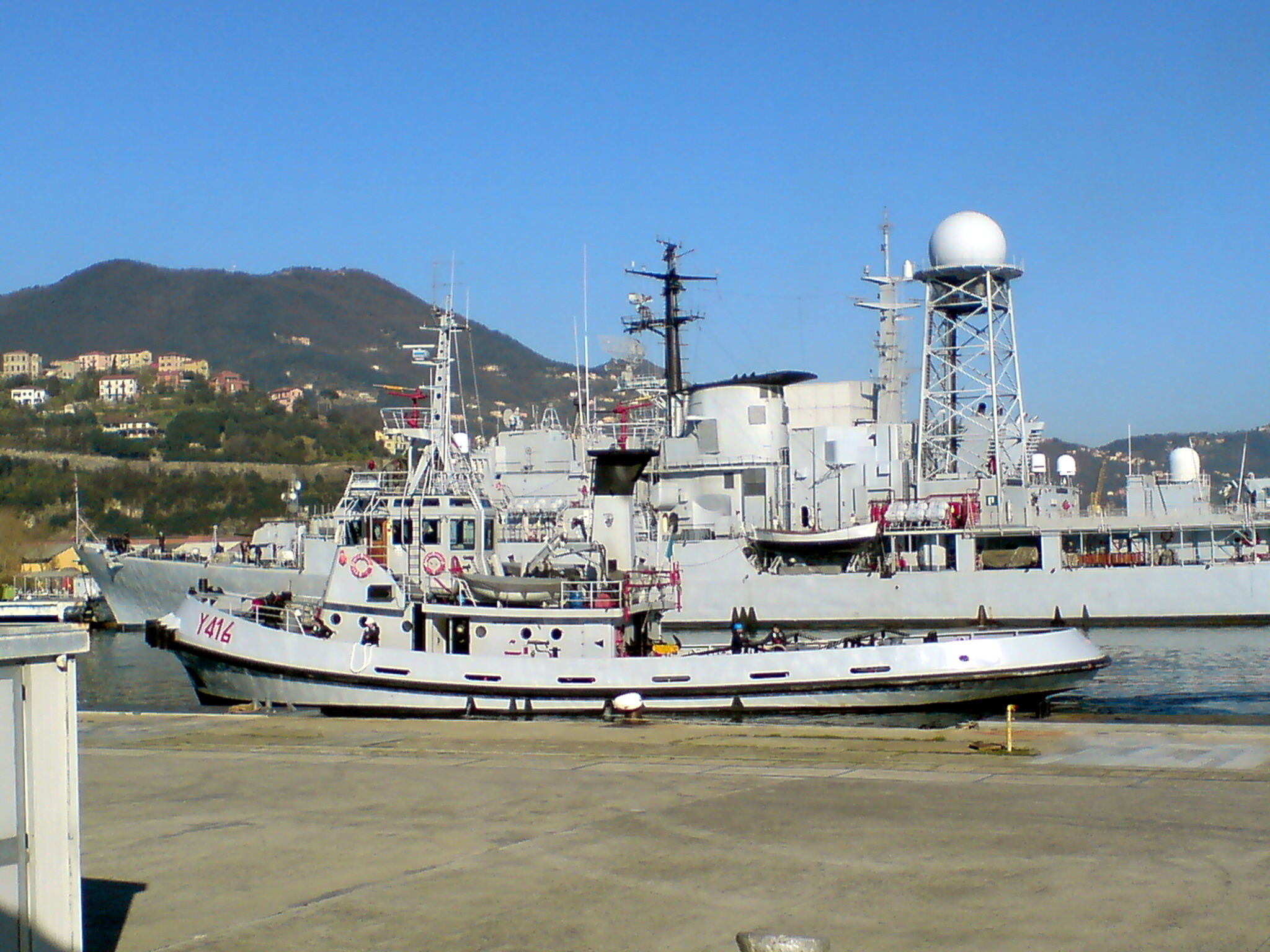 La fregata Carabiniere a La Spezia, dopo la trasformazione a Nave Esperienze dietro il rimorchiatore Porto Torres